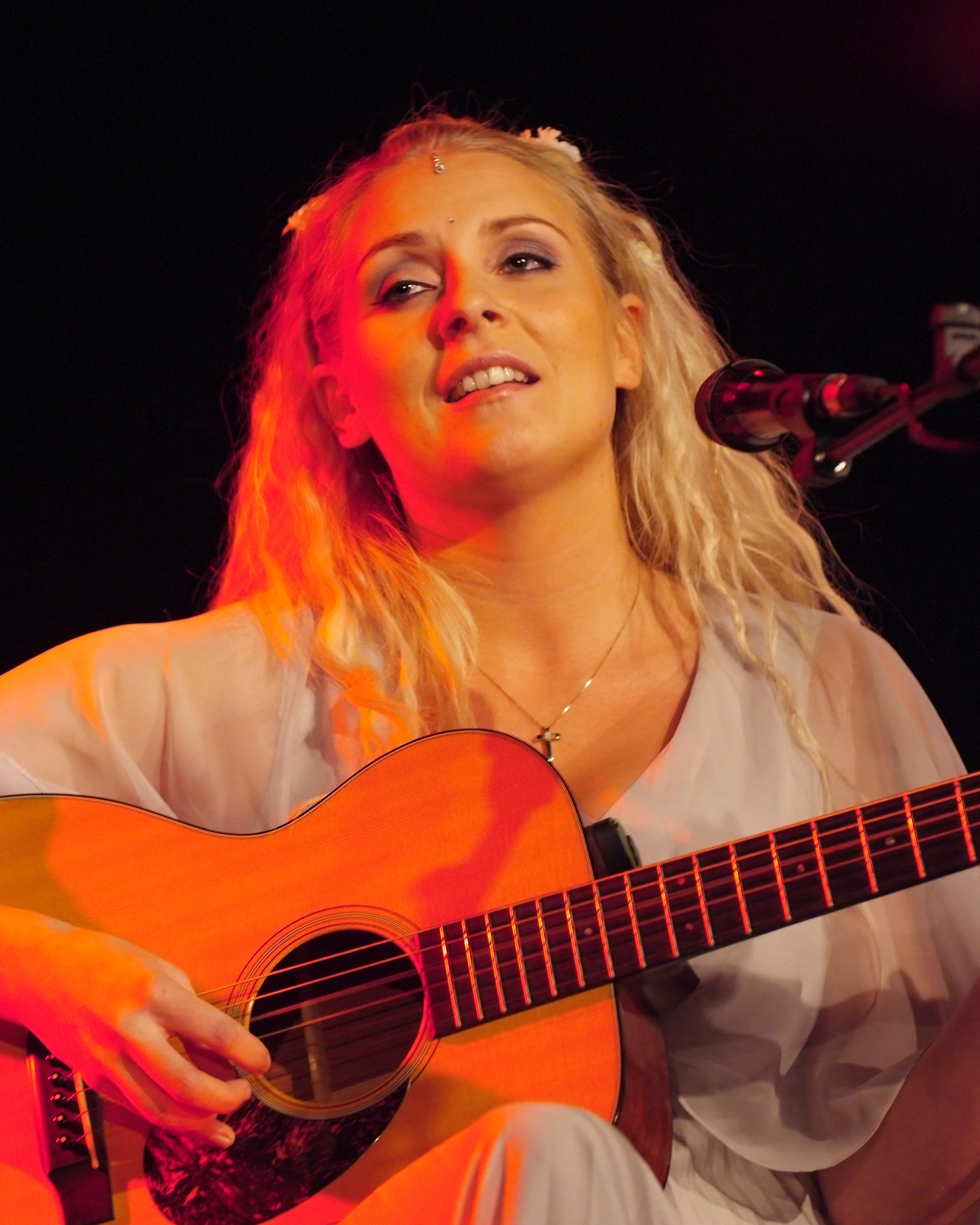 Eivør Pálsdóttir in Haderslev, Denmark